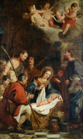 Adoração do Pastor, de Gaspar de Crayer (século XVII). Fonte: The Bridgeman Art Library